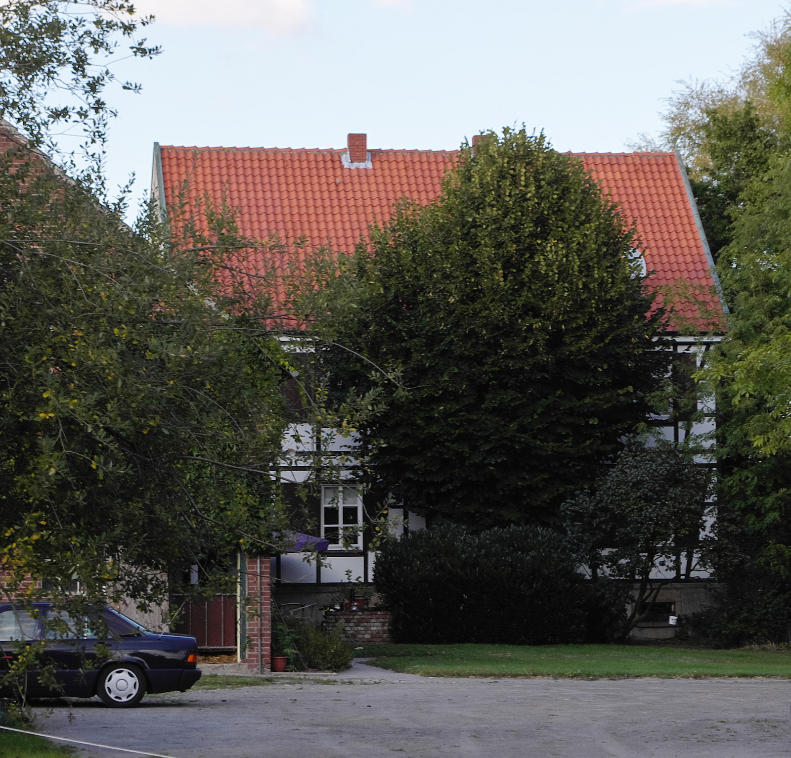 Denkmalgeschütztes Bauerngut in Bönen, Nordrhein-Westfalen. Denkmalnummer 51 der Denkmalschutzliste Bönen.